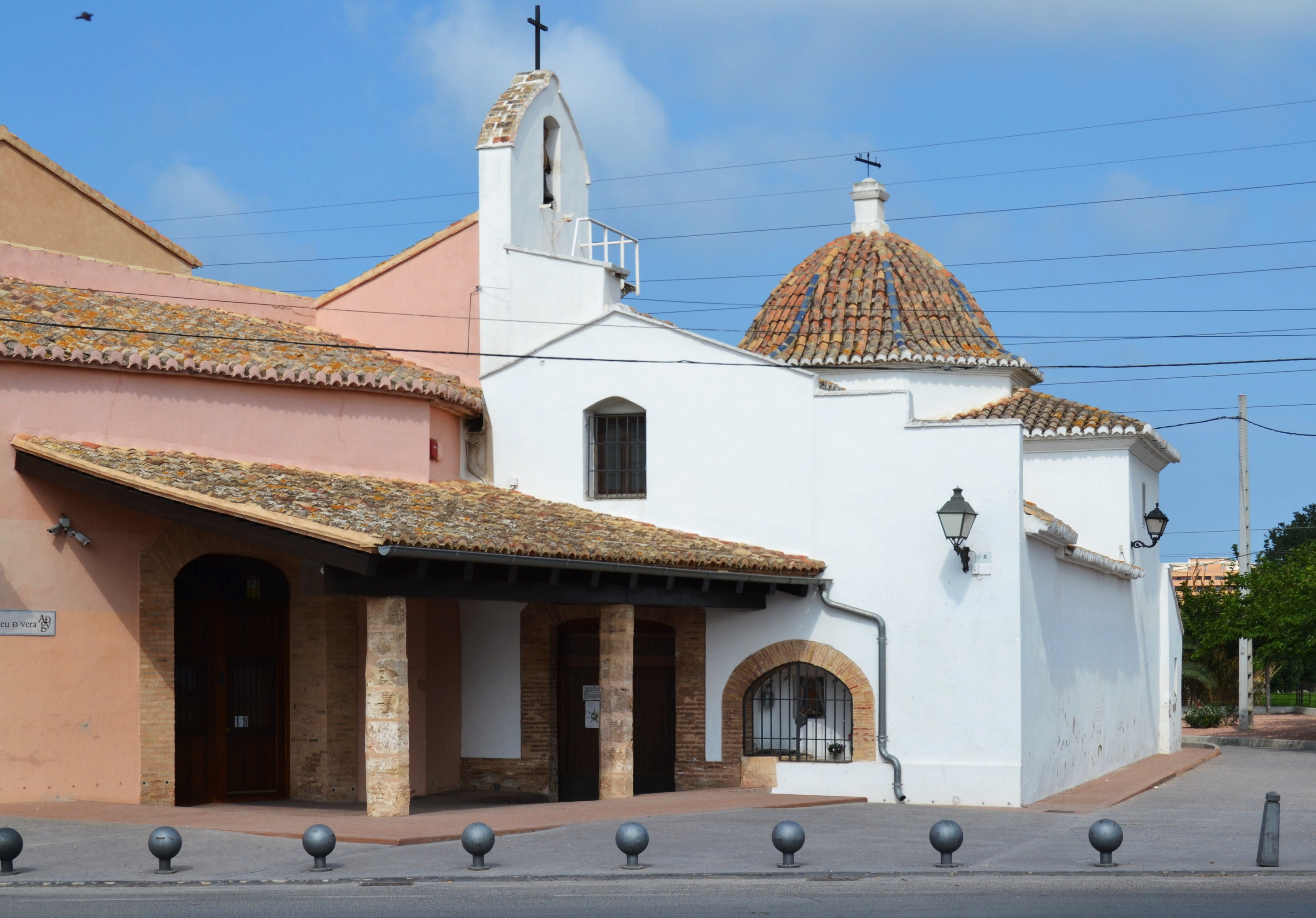 Ermita de Vera a València.